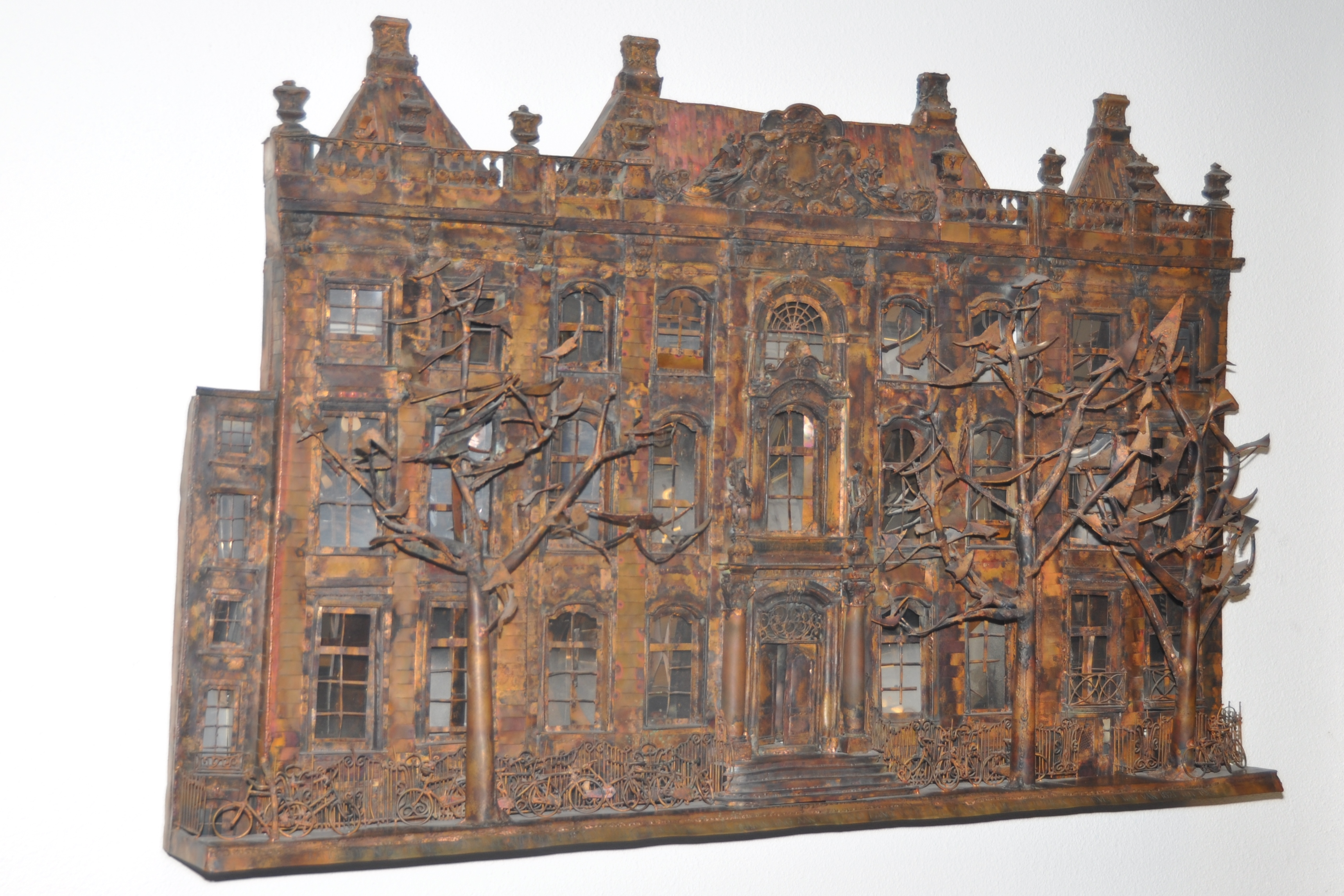 Wikimedia Nederland Nieuwjaarsborrel 2014. De maquette betreft het voormalige hoofdgebouw van de Koninklijke Bibliotheek, dat er huisde van 1819-1982, aan het Lange Voorhout in Den Haag, genaamd "Huis Huguetan". Sinds 1988 zit er de Hoge Raad der Nederlanden, dat medio januari 2016 zal verhuizen naar nieuwbouw aan het Haagse Korte Voorhout.